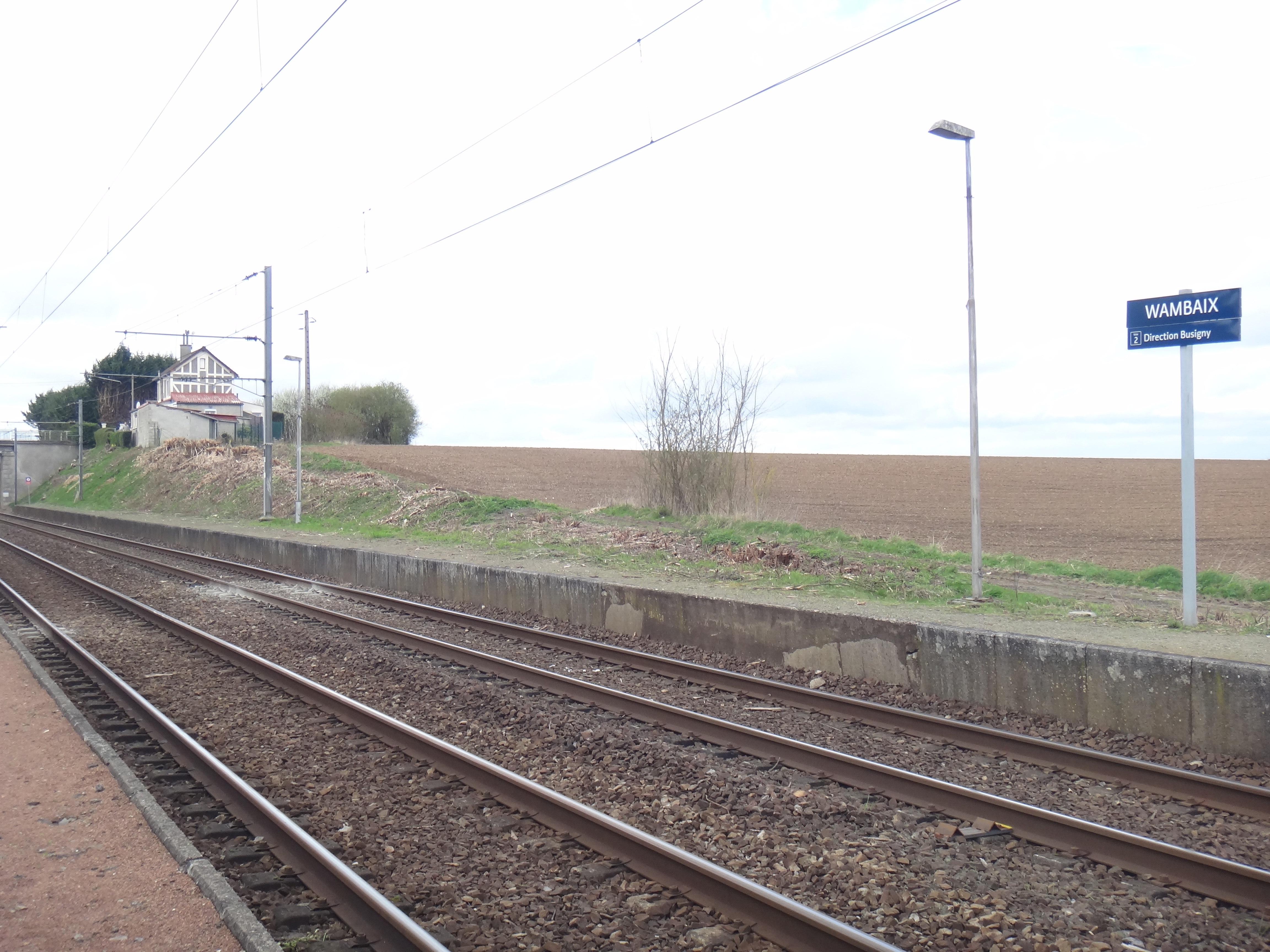 Gare de Wambaix, Nord, France, en 2014